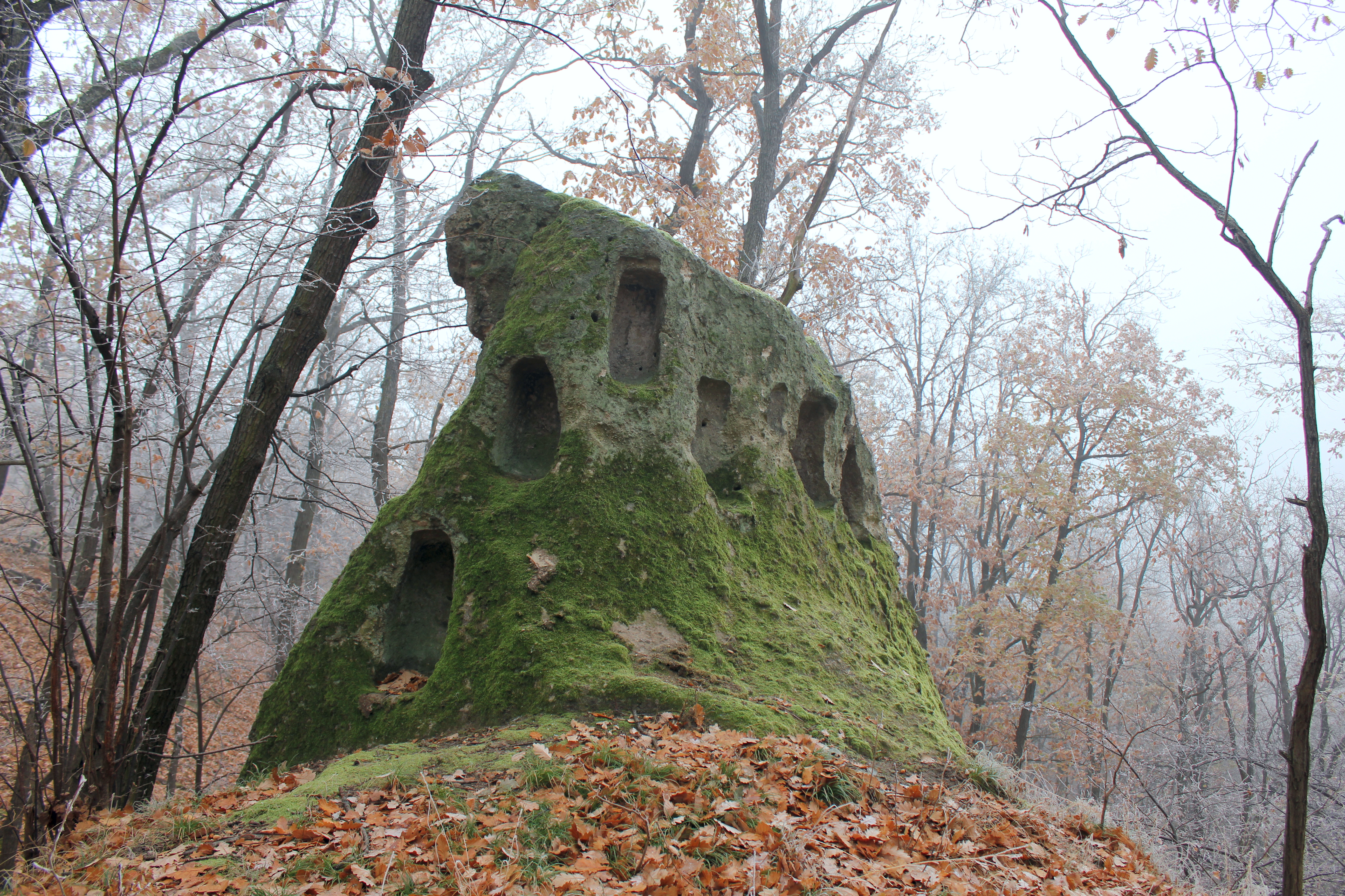 16a. Cserépváralja Nagy-Bábaszék ÉK-i oldala